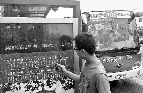 中文（中国大陆）: Bengbu Bus No.106 Old